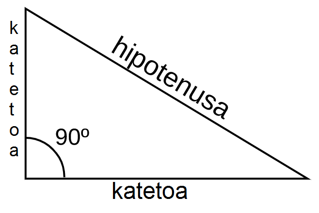 Triangelu angeluzuzen baten zatiak erakusten dituen irudia